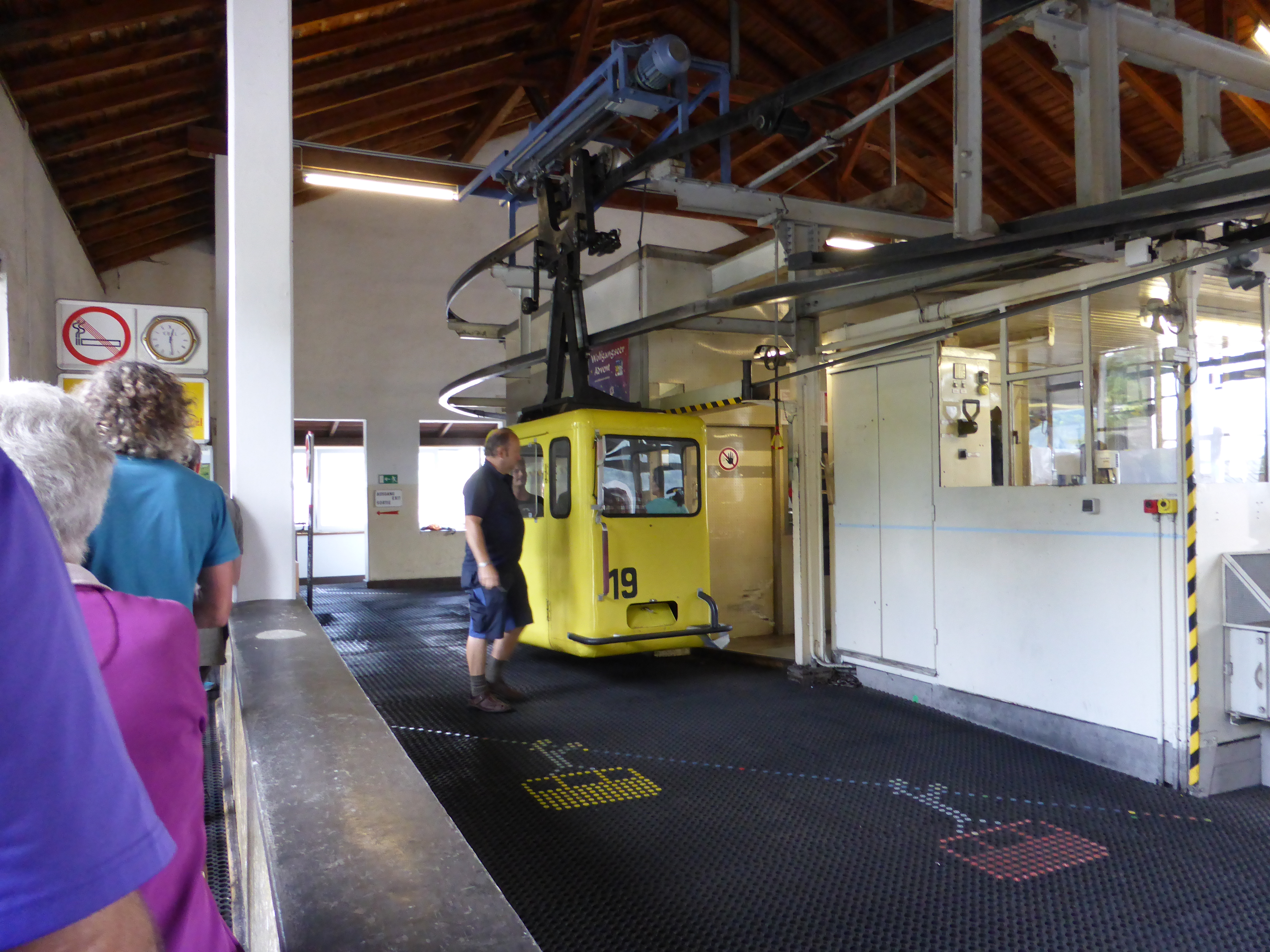 In den Stationen fahren die Kabinen vom Tragseil auf eine Hängeschiene, Abfertigungshalle Talstation Zwölferhornbahn